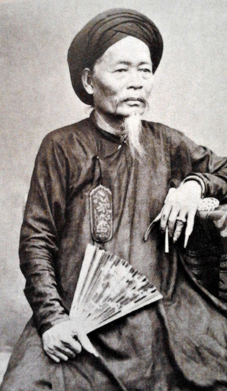 Mandarin. Photo d'Emile Gsell dans son studio de Saigon (années 1870)